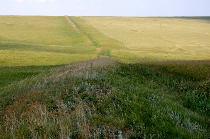 辽代边壕戍堡遗址